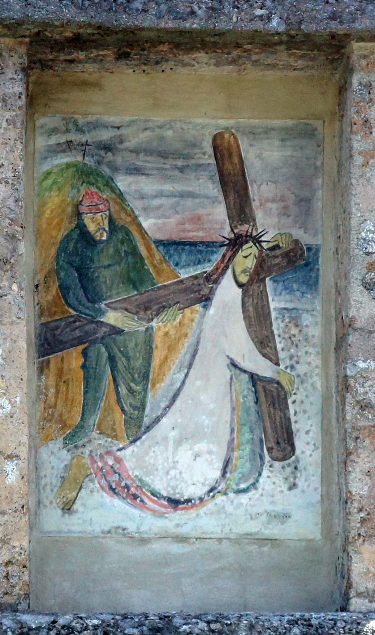 Detail des Bildstockes an der Haller Straße